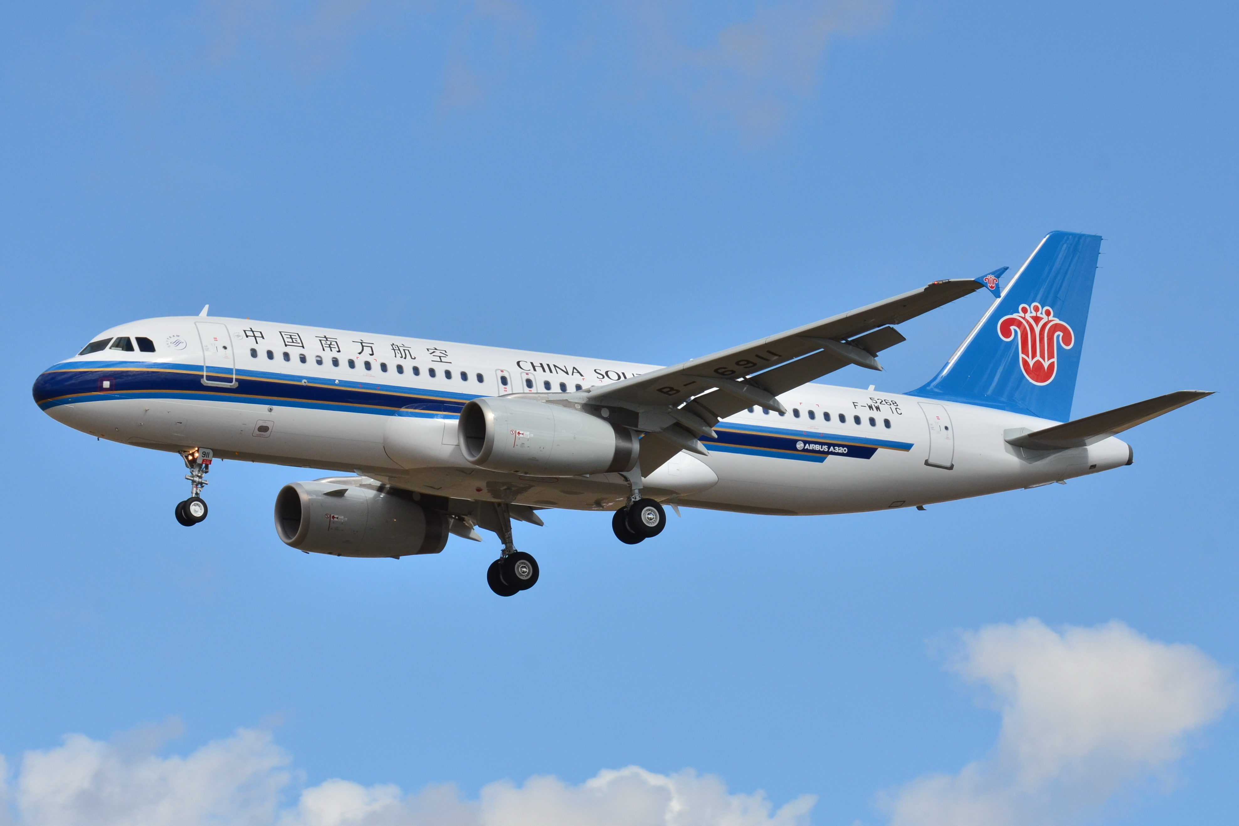 Photo prise à l'aéroport de Toulouse-Blagnac (LFBO) en France. Picture take at Toulouse-Blagnac Airport (LFBO) in France.